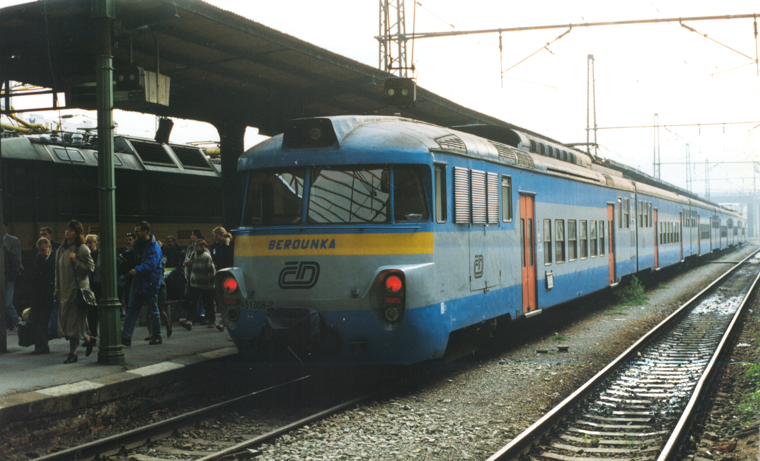 Šestivozová elektrická jednotka ČD s čelním vozem 451.008-7 "Berounka" netypicky na Masarykově nádraží na osobním vlaku z Roudnice